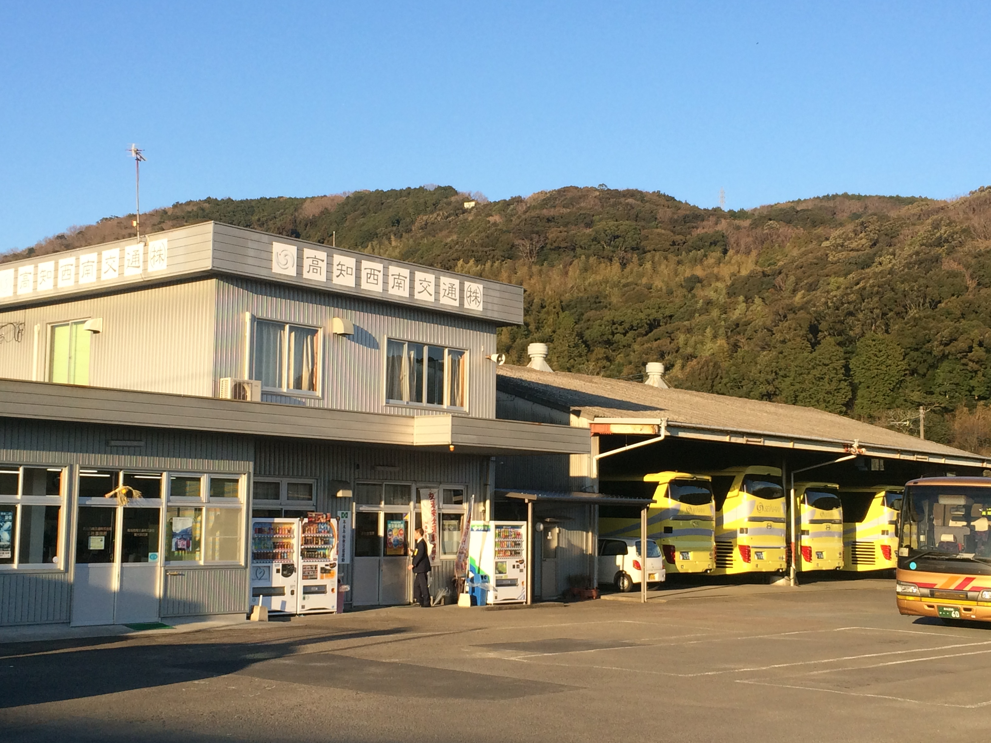 高知西南交通本社